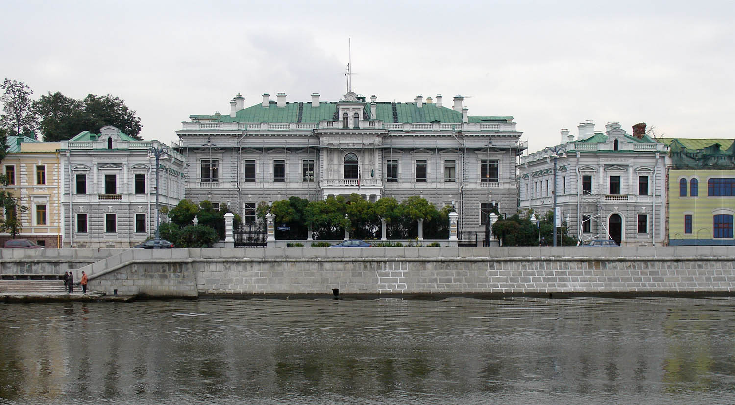 Sofiyskaya Embankment, Moscow